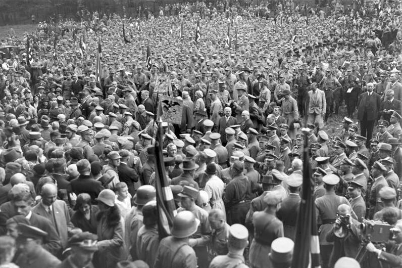 Aufmarsch der nationalen Opposition unter Führung von Hugenberg und Hitler in Bad Harzburg ! Der grosse Feldgottesdienst der nationalen Verbände auf der Tagung in Bad Harzburg.